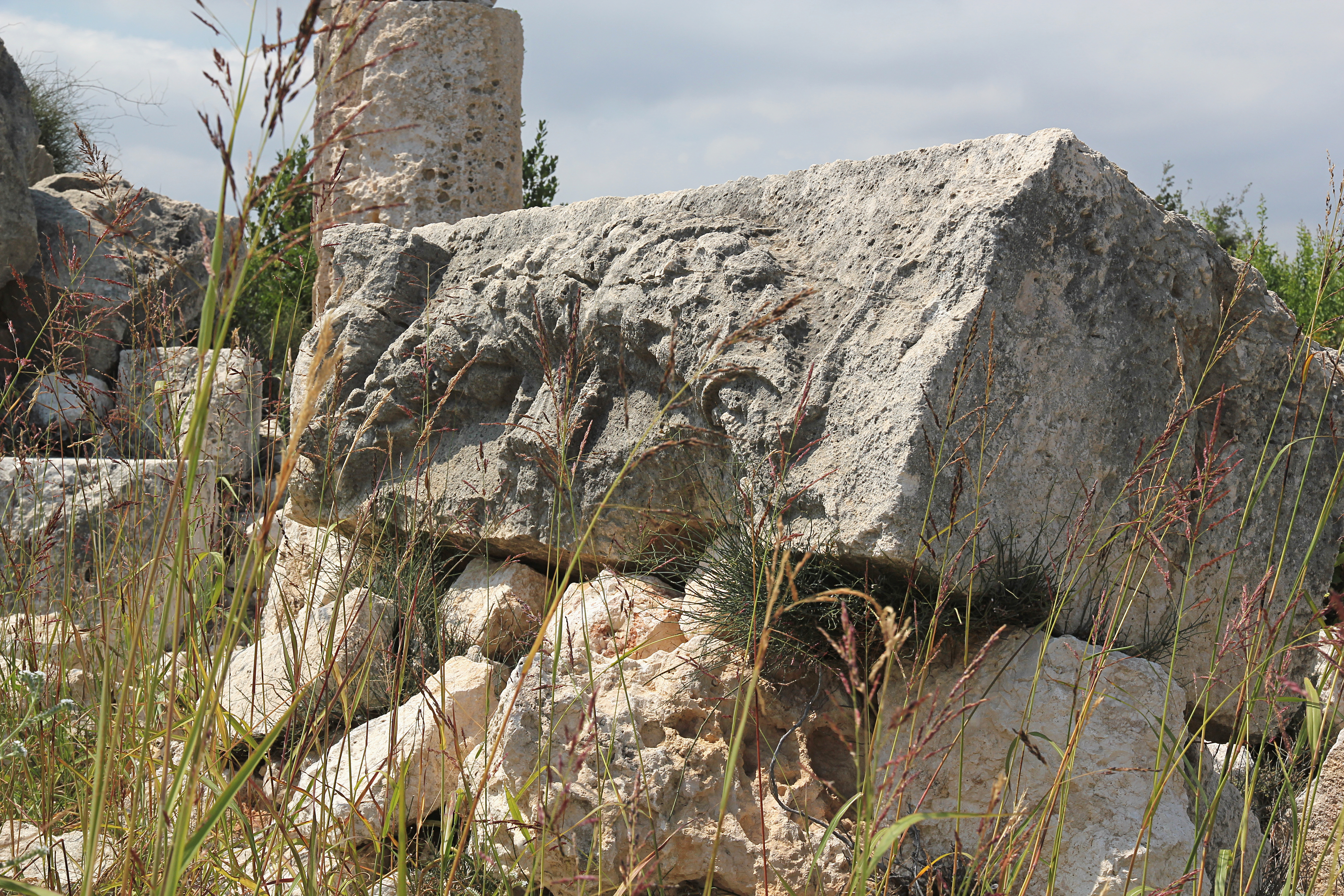 Elaiussa Sebaste, antike Stadt bei Erdemli, Südtürkei, römischer Tempel, Fragment des Cellafrieses